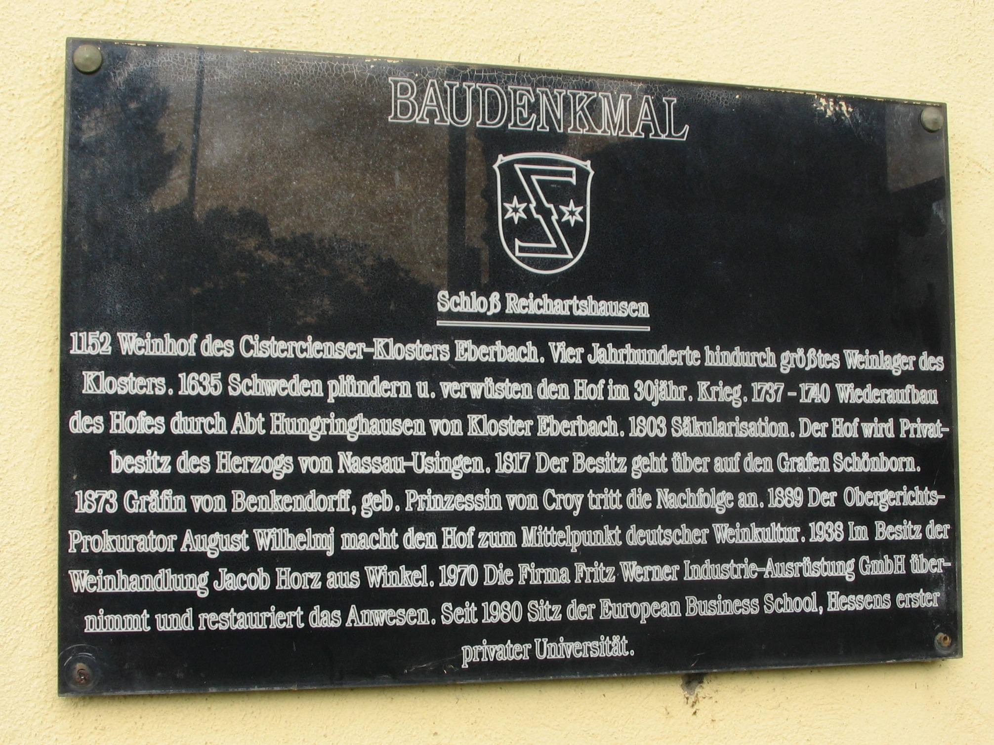 Beschreibung der Geschichte von Schloss Reichartshausen auf einer Schrifttafel am Tor zum Schlosspark